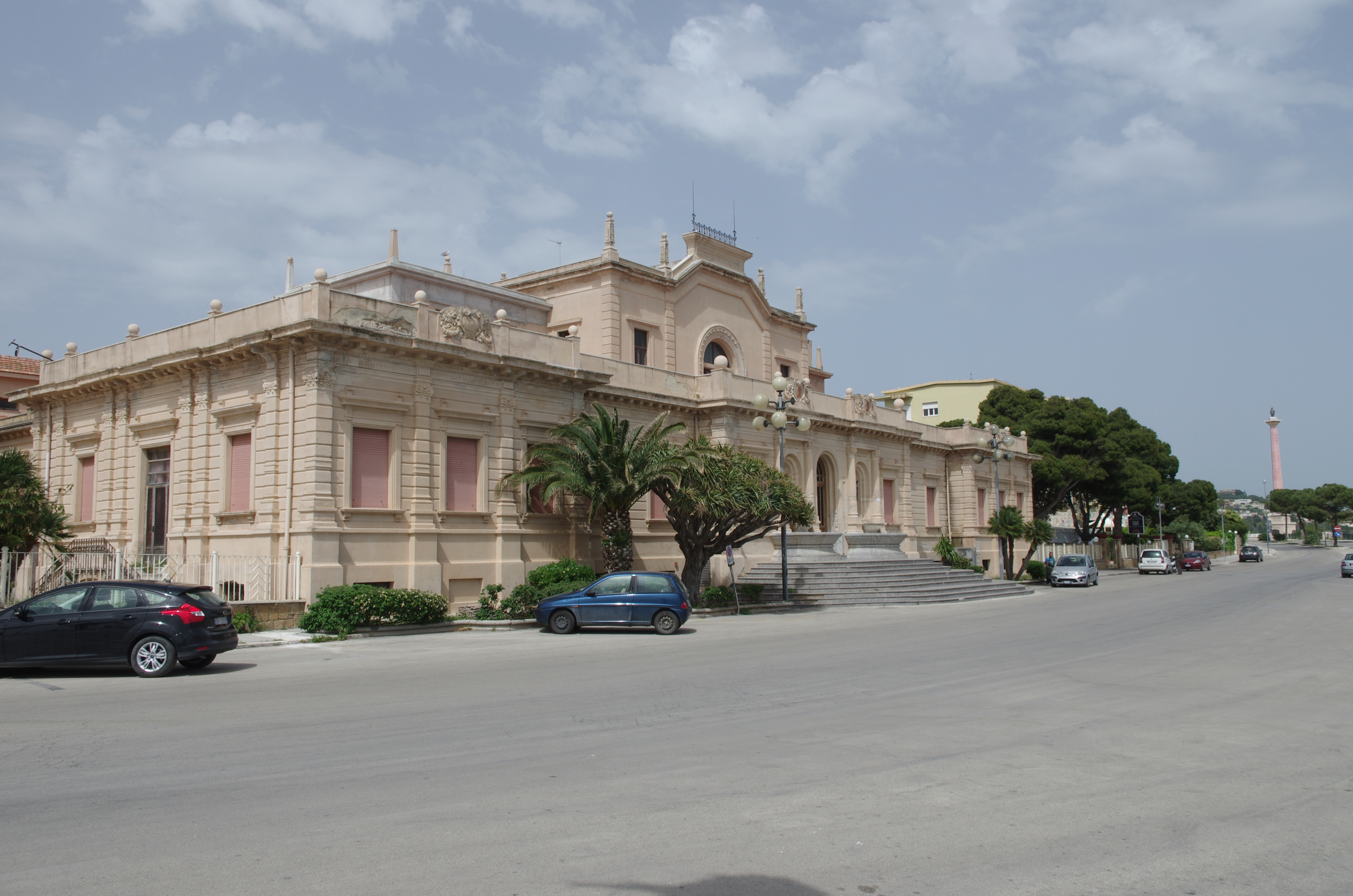 Die Terme in Sciacca befindet sich über dem Hafen.